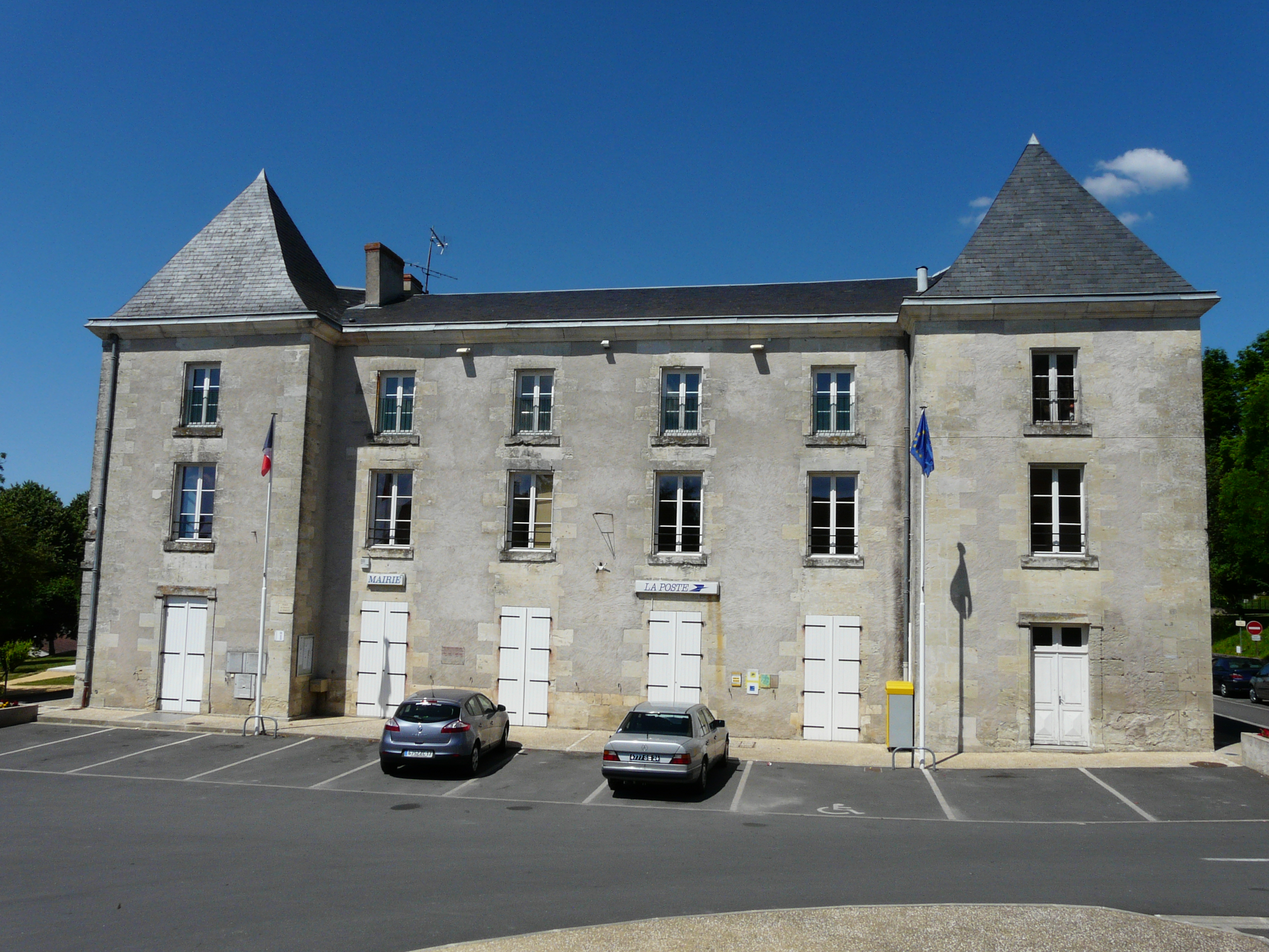 La façade sud-est de la mairie de Mensignac (château de Mensignac), Dordogne, France